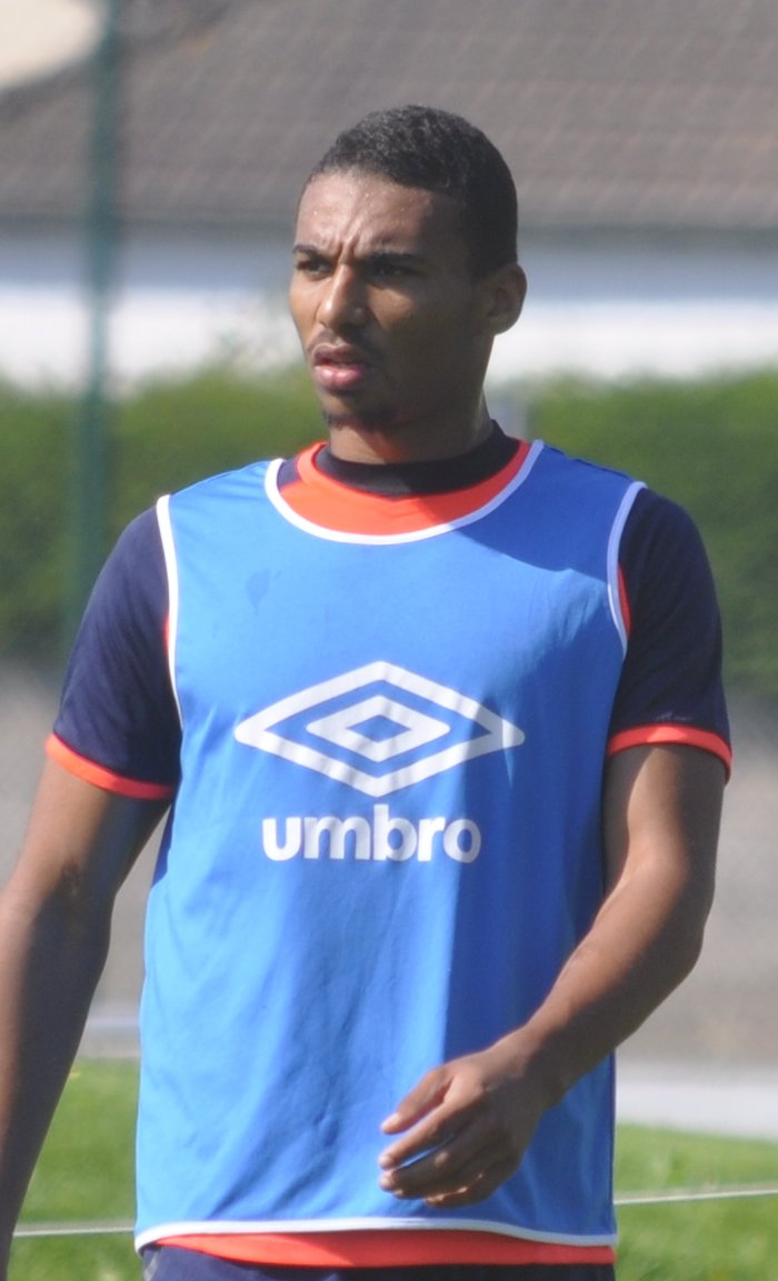 Alexander Djiku lors d'un entrainement du SM Caen